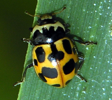 Hippodamia (Semiadalia) notata (Laicharting 1781) Fam. Coccinellidae.